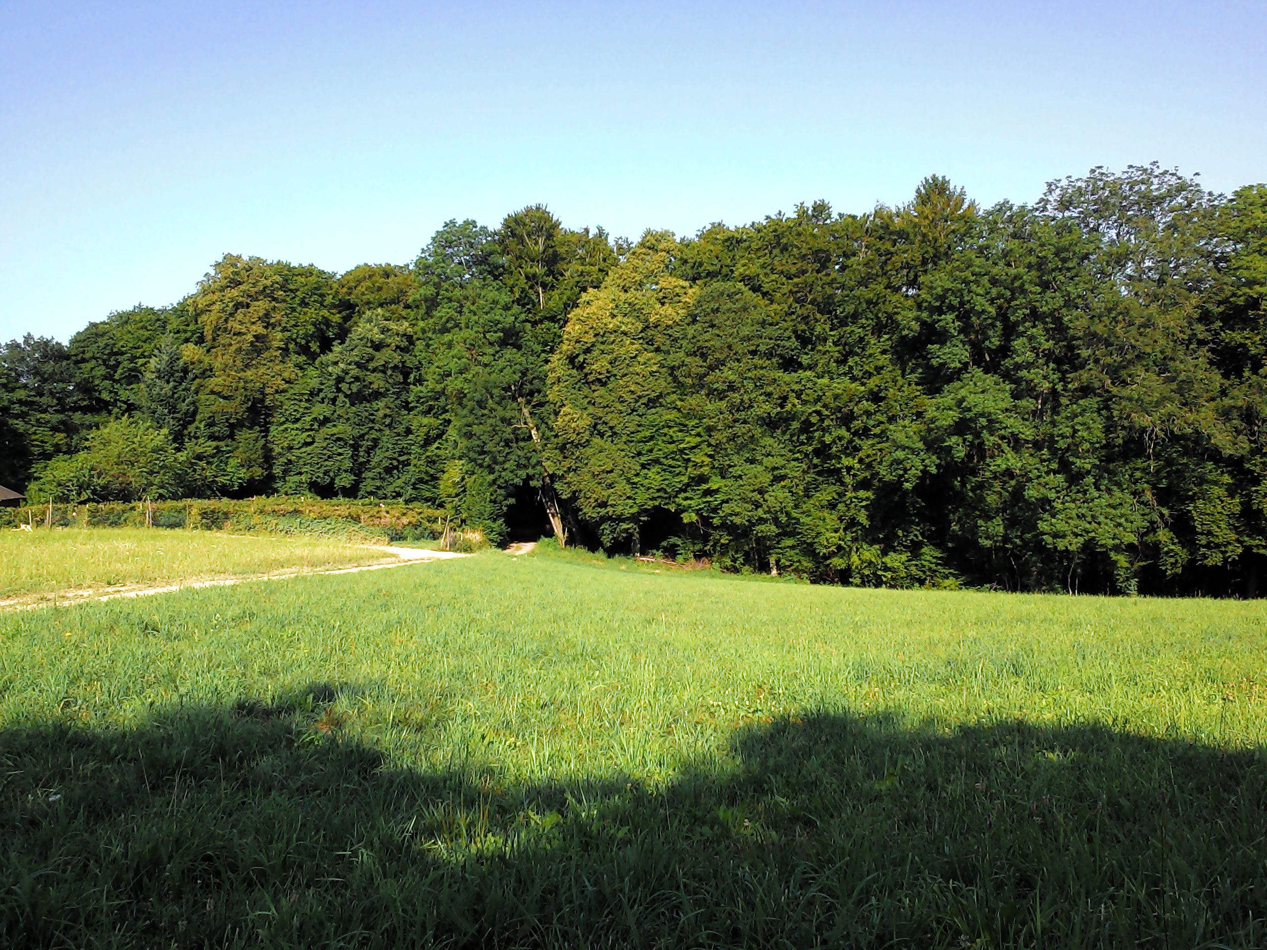 Semberg bei Schwerzen, Gemeinde Wutöschingen, Ringwallburg, Eingangsbereich zur Gipfelbefestigung.